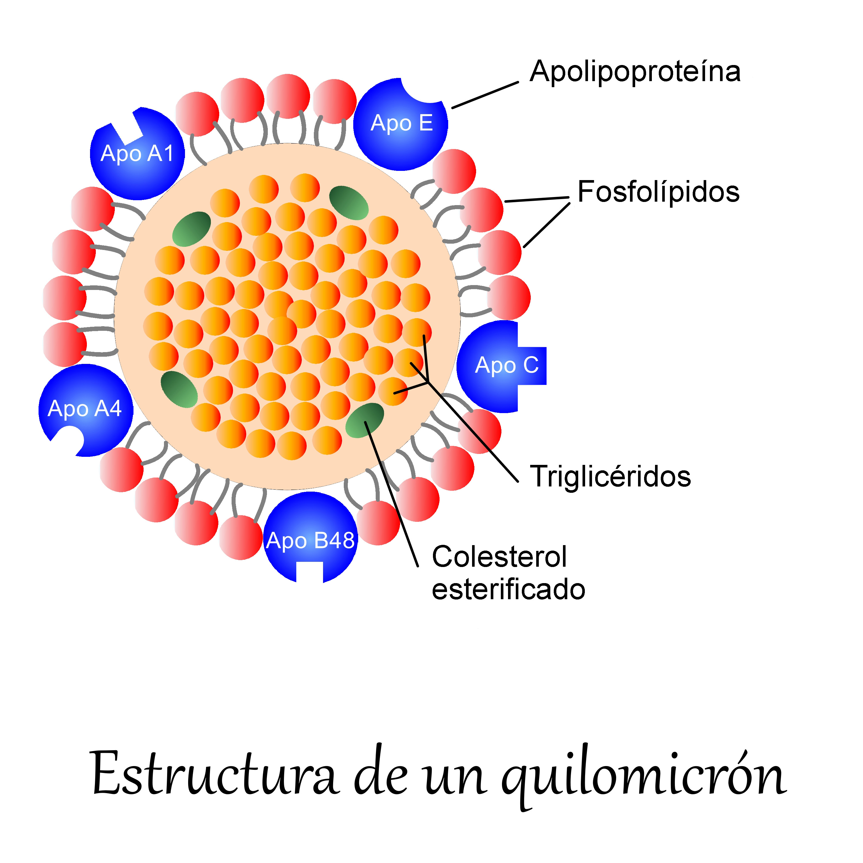 Estructura de un quilomicron en la que puede observarse la cubierta superficial de fosfolípidos y apoproteínas. En el interior se localizan los triglicéridos y el colesterol esterificado.